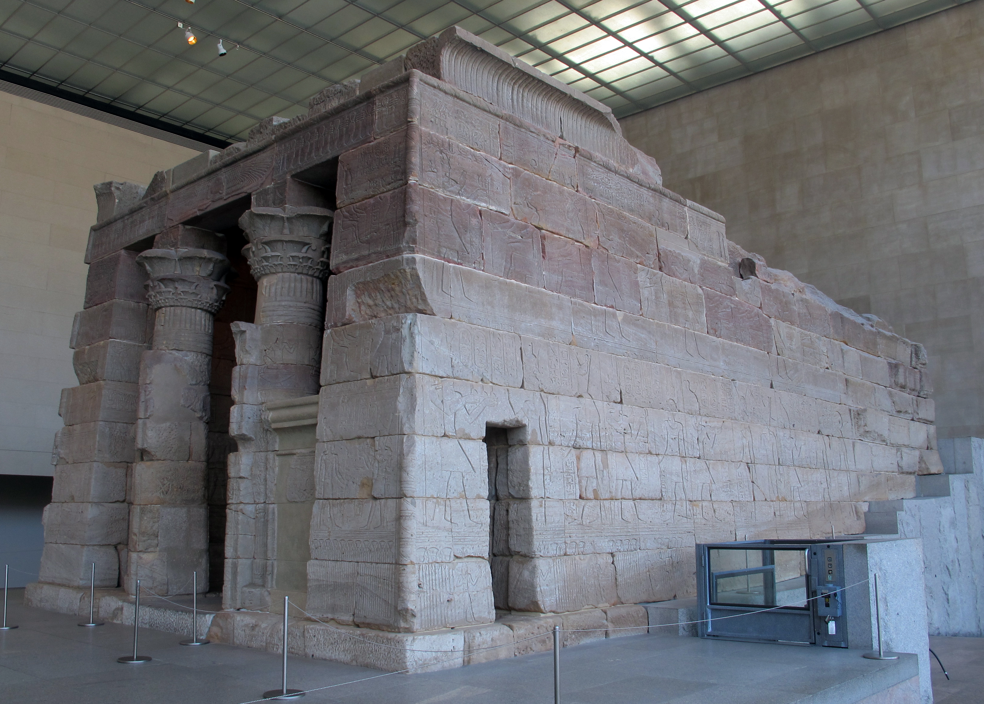 Collezione del Metropolitan Museum, NYC